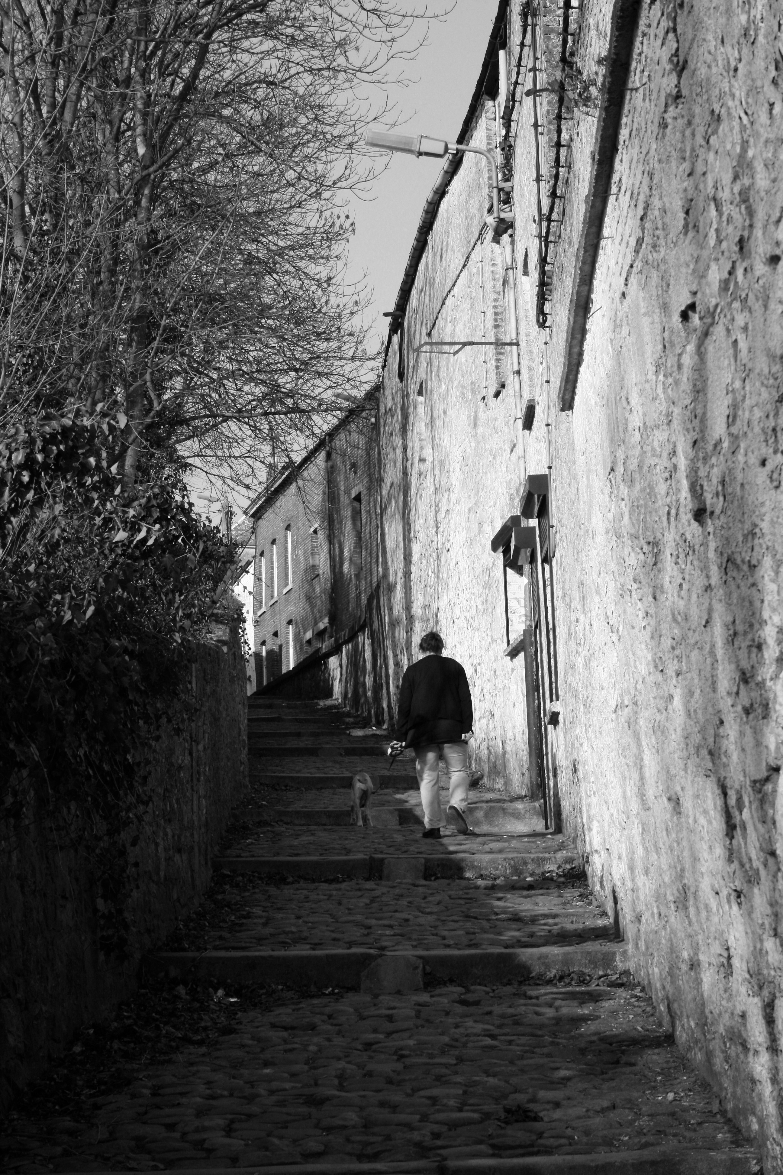 Beaumont (Hainaut) (Belgique), les escaliers de la ruelle des Quatre Bonnets